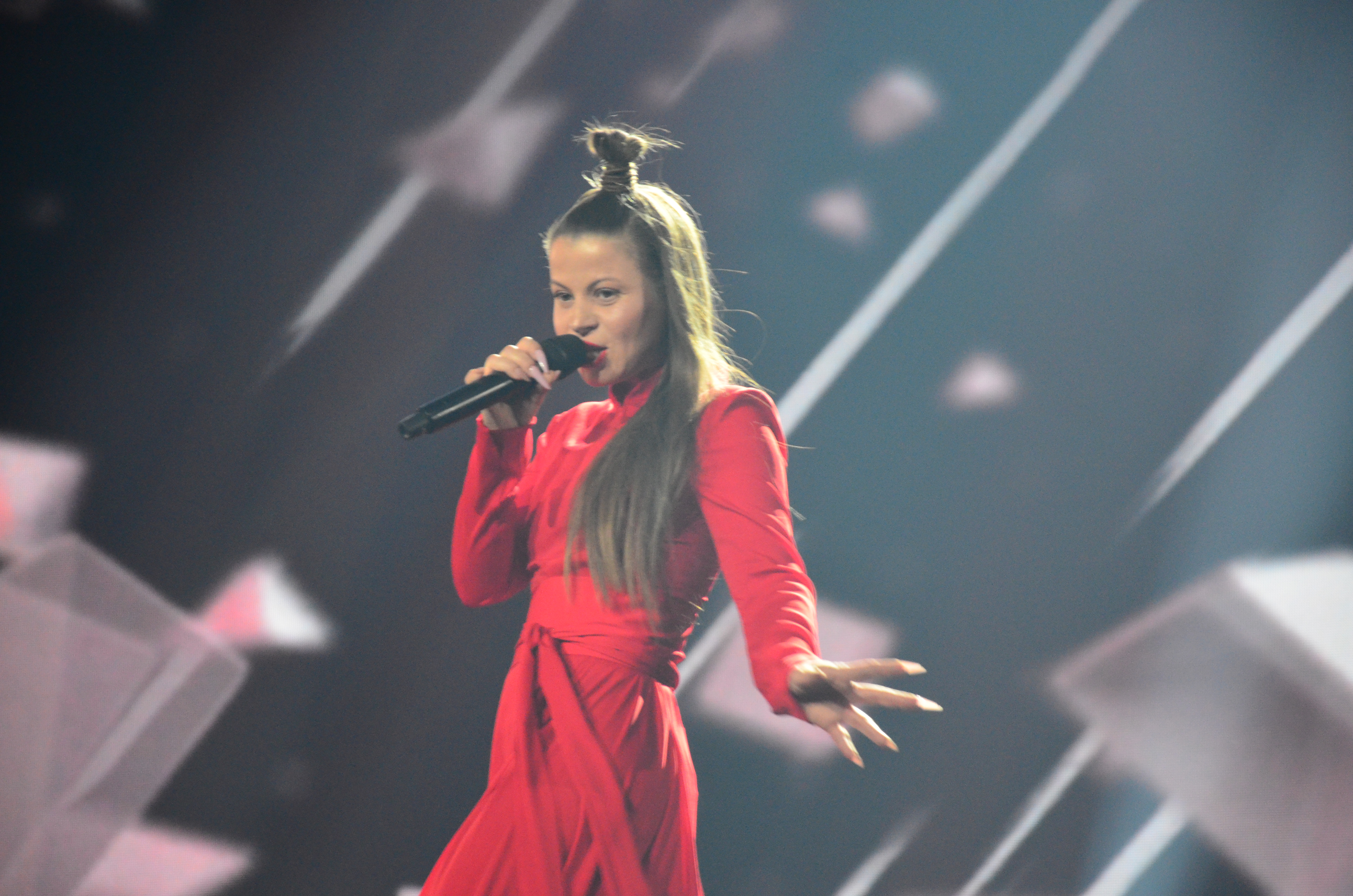 10 травня 2017 року у Києві відбулась генеральна репетиція 2 півфіналу "Євробачення".